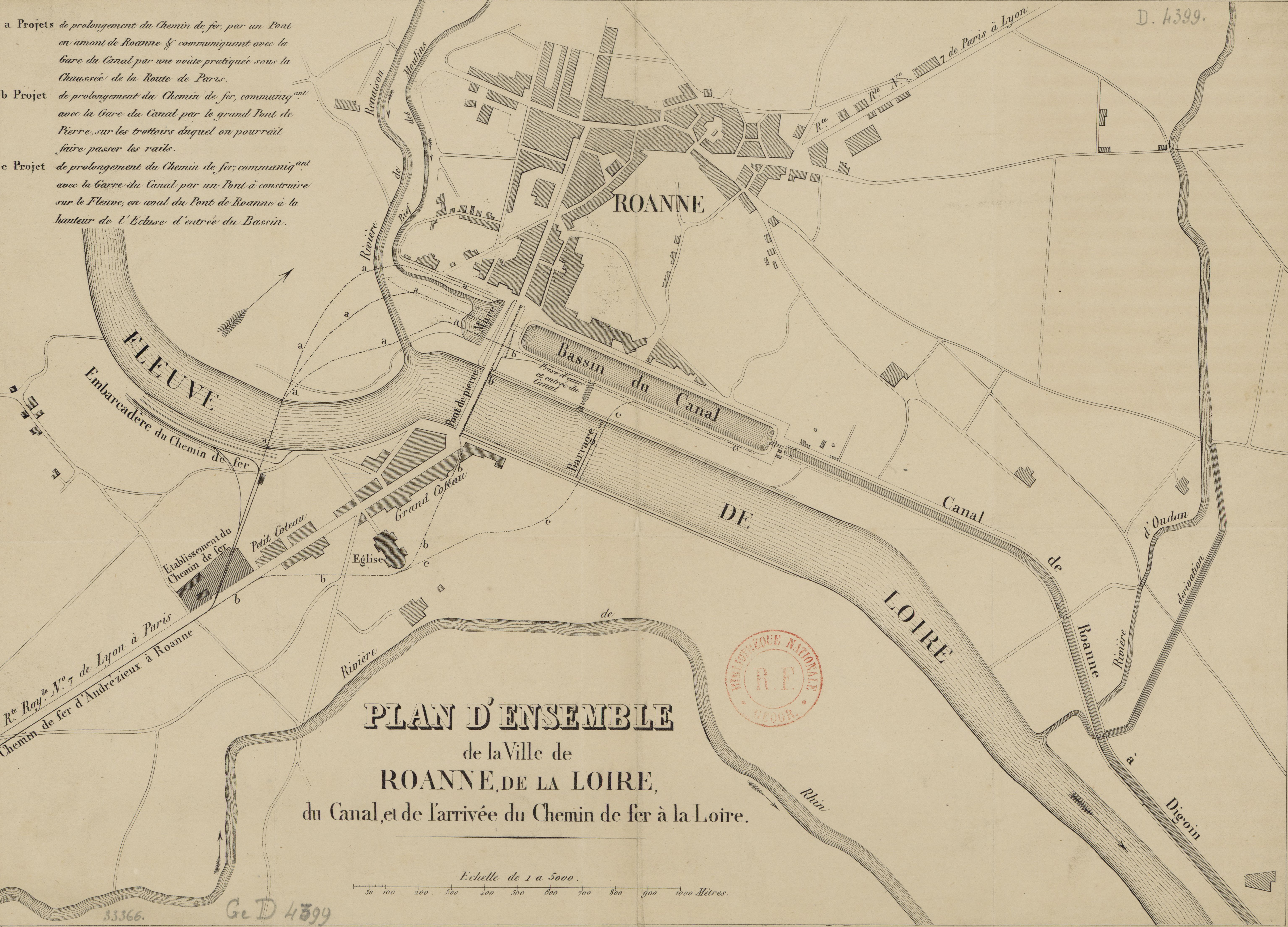 Titre : Plan d'ensemble de la ville de Roanne, de la Loire, du Canal et de l'arrivée du chemin de fer à la Loire Éditeur : [s.n.] Date d'édition : 1845 Sujet : Roanne Type : document cartographique,carte,image fixe Langue : Français Format : 1 flle ; 40 x 24 cm Droits : domaine public Identifiant : ark:/12148/btv1b84434771 Source : Bibliothèque nationale de France, GED-4399 Relation : Description : Échelle(s) : 1:5 000 Provenance : bnf.fr Date de mise en ligne : 25/07/2011 Bibliothèque nationale de France